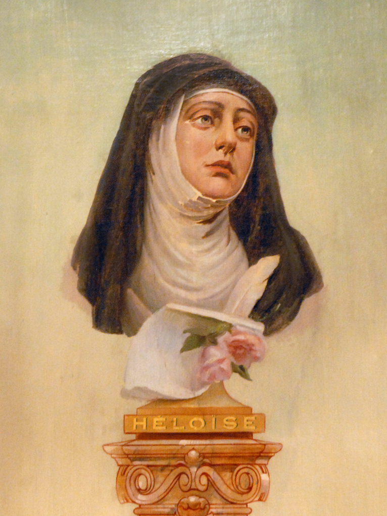 Représentation d'Héloïse sur le calendrier positiviste du mur gauche de la chapelle de l'Humanité (5 rue Payenne, à Paris) Selon la religion positiviste, les femmes assurent la médiation entre les hommes et l'Humanité, elles sont célébrées notamment le jour additionnel des années bissextiles lors de la Fête générale des Saintes Femmes ! Auguste Comte (philosophe, 1798- 1857), grand esprit de son temps, le fondateur du positivisme, a construit une des plus grandes philosophies systématiques du XIXè siècle. Sa philosophie positive se compose : - d'une philosophie des sciences qui réordonne toute l'encyclopédie et y ajoute la sociologie, - d'une philosophie politique et sociale qui veut réorganiser la société en France, en Occident et dans le monde. La rencontre d'Auguste Comte et de Clotilde de Vaux eu lieu en 1845, elle mourut un an plus tard rue Payenne, la maison voisine a été transformée en Chapelle positiviste par l'Eglise positiviste du Brésil (voir la photo). C'est sous son influence et en son souvenir qu'Auguste Comte a imaginé une religion dont le culte est l'Humanité elle-même. Une évolution étrange qui a abouti à la représentation de Clotilde de Vaux en "Vierge Marie" dans les chapelles de l'Humanité ou sur la sculpture place de la Sorbonne à la gloire du Positivisme. ( La Maison d'Auguste Comte Wikipedia sur l'Eglise de l'Humanité